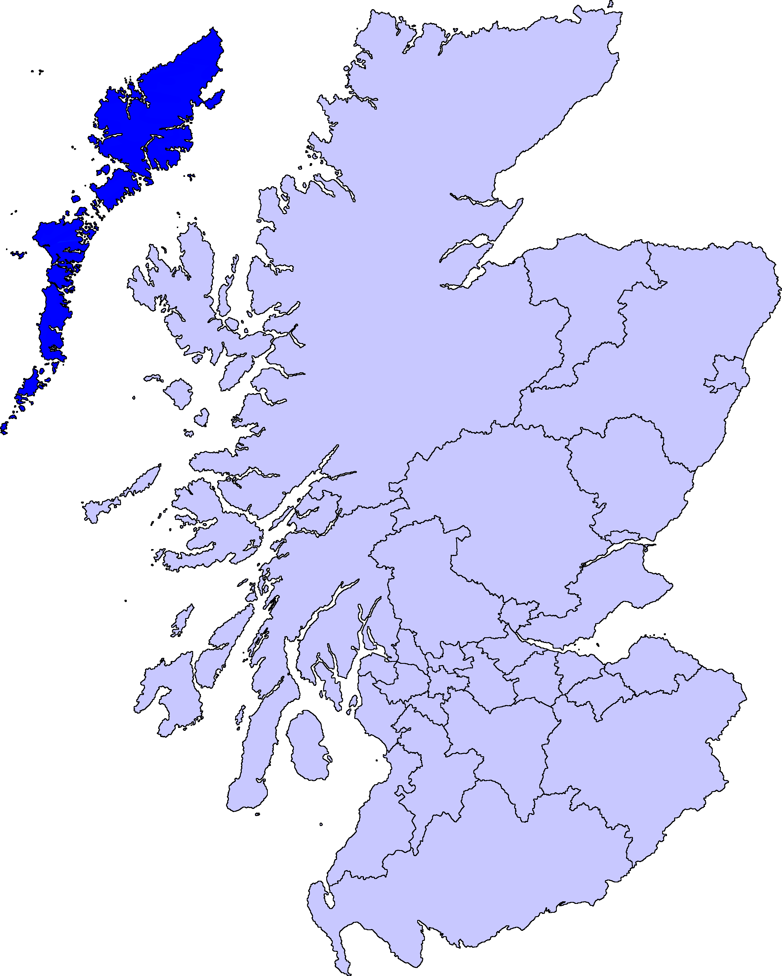 map of Na h-Eileanan Siar